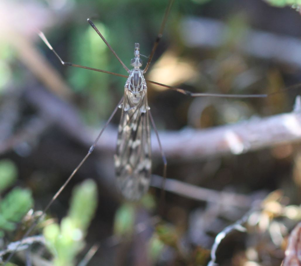 Schnake Tipula cf. confusa am 13. Oktober 2018 in der Schwetzinger Hardt am Hockenheimring